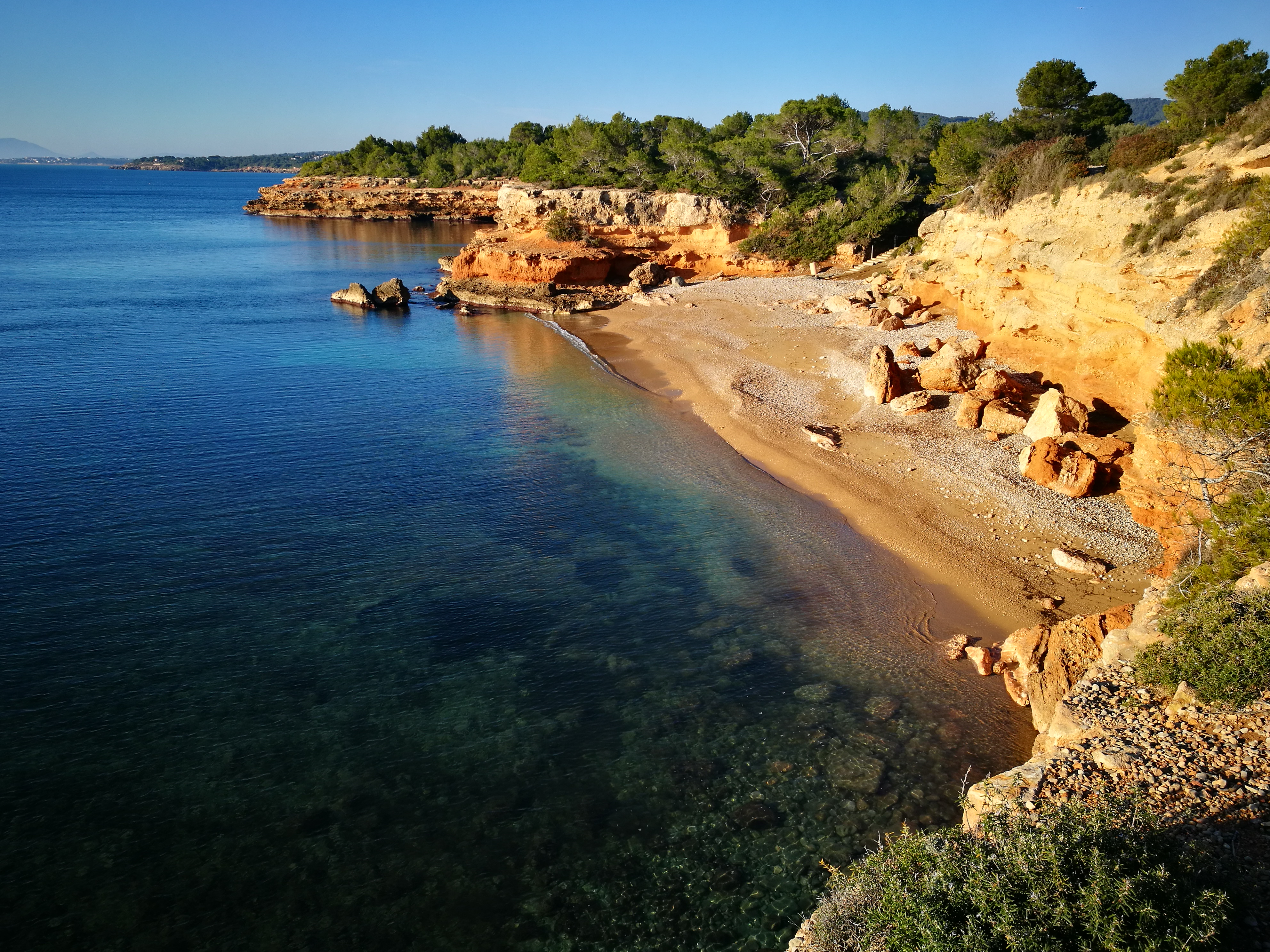 Fotografia de la Cala de la Llenya, una de les 30 cales i platges de la costa de l'Ametlla de Mar.